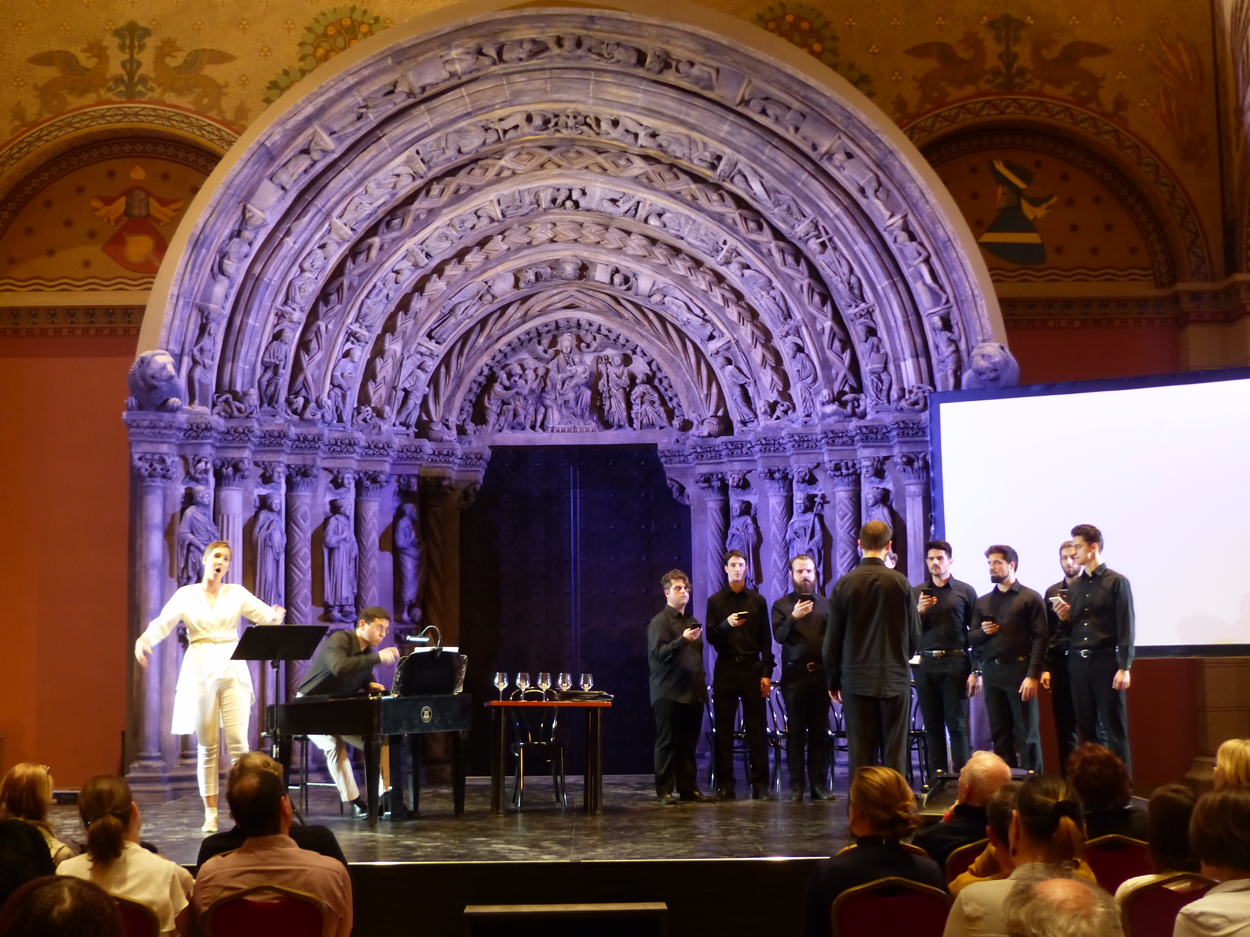 Molnár Anna énekes, Euripidesz Kamarakórus. A felvétel 2018. december 12-én készült a Szépművészeti Múzeum Román Csarnokában. Euripidész Kamarakórus (művészeti vezető: Lozsányi Soma), Szalai András – cimbalom, Balogh Máté – üvegpoharak. Balogh Máté és Tornyai Péter zeneszerzők 2017-ben kaptak felkérést a Szépművészeti Múzeumtól egy ógörög zenei projekt (Mousziké – az antik zene hangjai) megvalósítására. Ennek egyik része egy-egy zenemű létrehozása volt Euripidész Antiopé című, töredékesen fennmaradt drámájának felhasználásával.